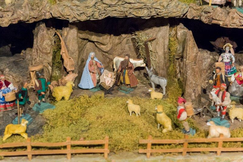 Weihnachtskrippe